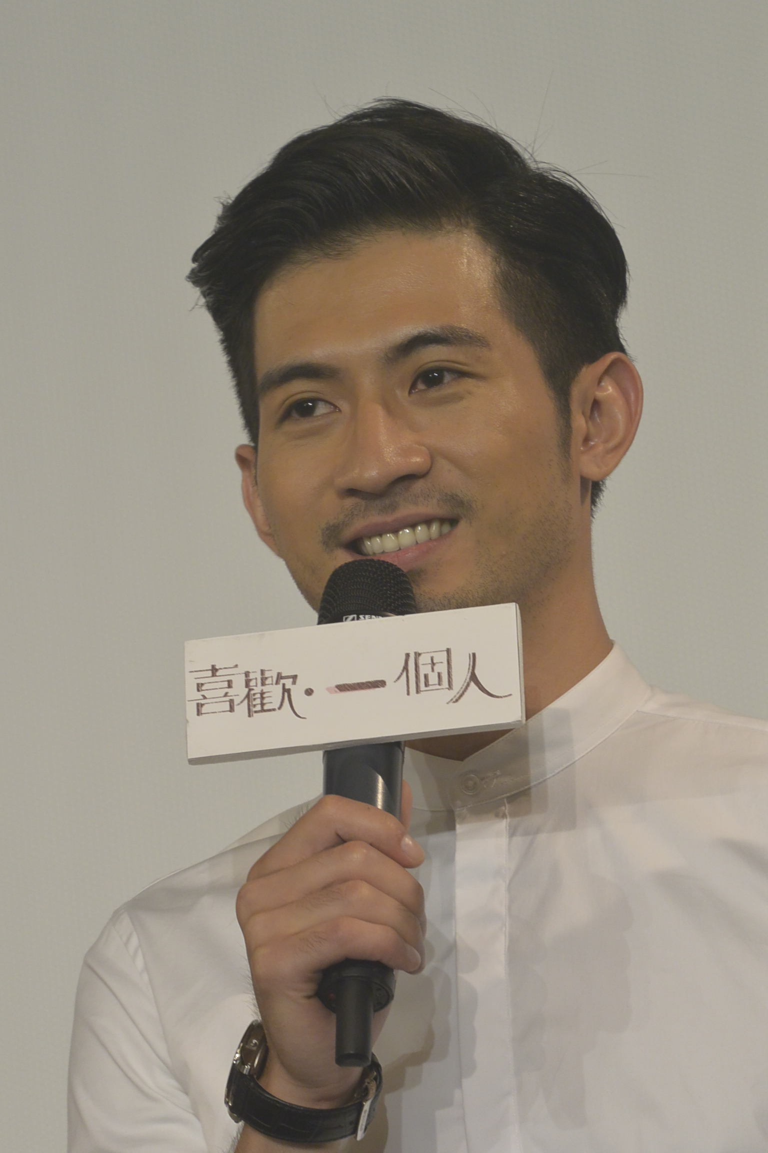 喜歡．一個人《最終回》粉絲見面會